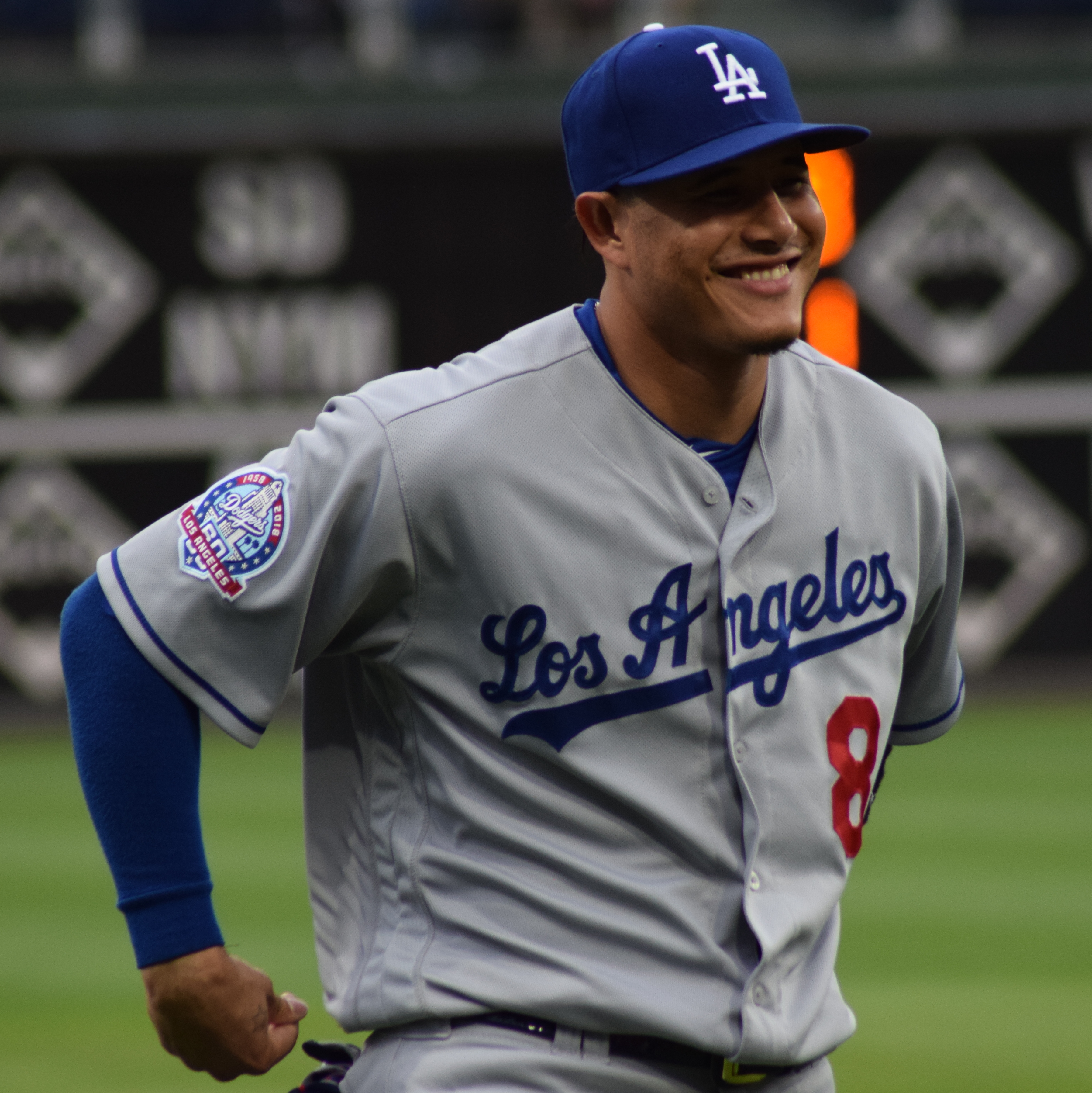 Manny Machado